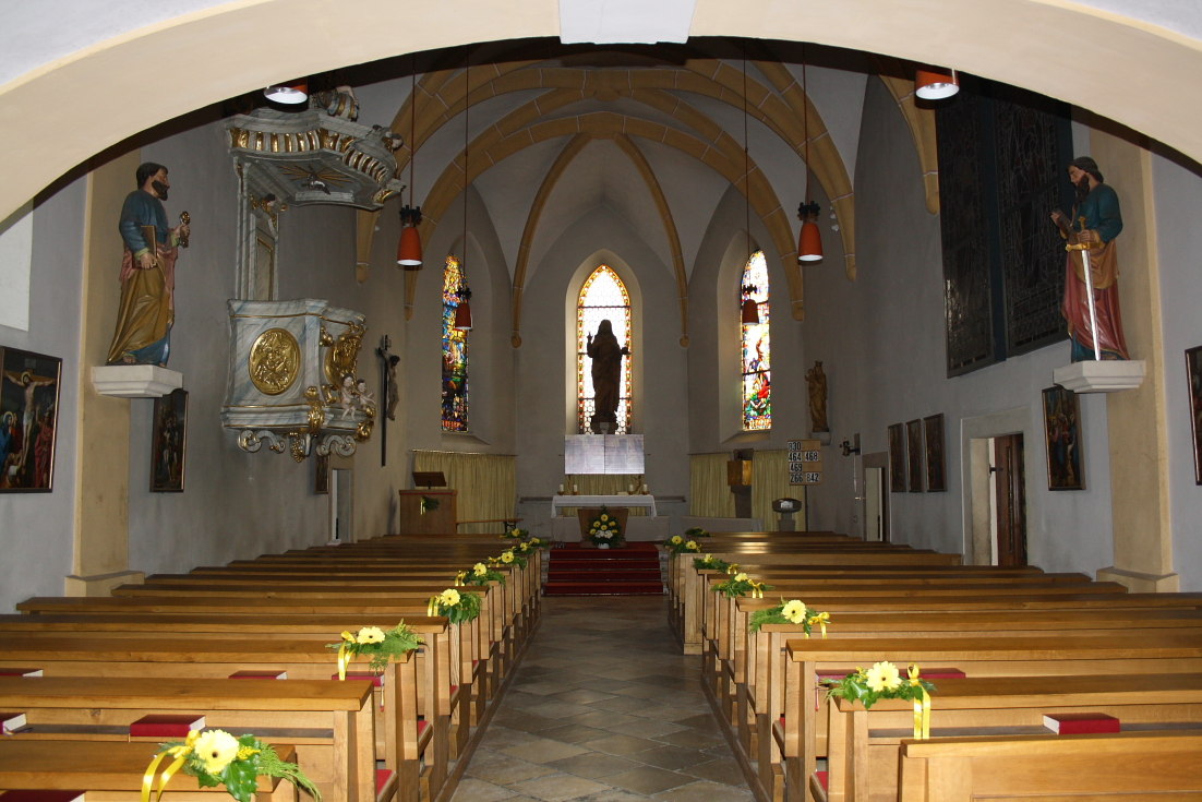 Innenansicht in Richtung Altar der Weidlinger Pfarrkirche, Gemeinde Klosterneuburg, Niederösterreich.